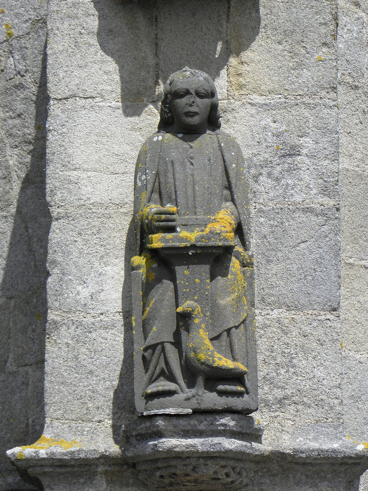 Statue de Saint-Jean l'évangéliste au contrefort sud de la façade occidentale de la chapelle Saint-Tugen en Primelin (29).